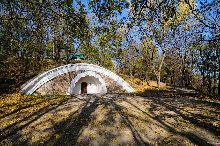 Грот декабристів в садибі Давидових в м.Кам'янка Черкаської обл.